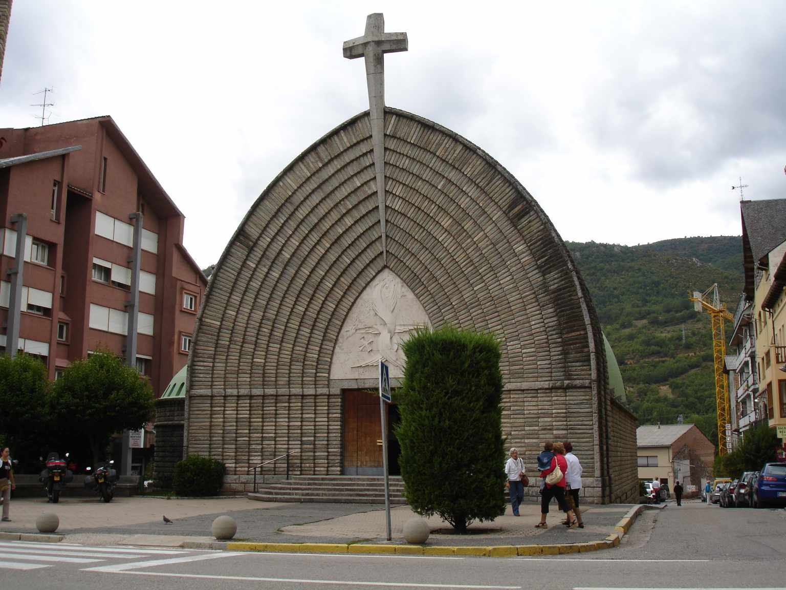 El Pont de Suert (Alta Ribagorça, Lleida, Catalunya)